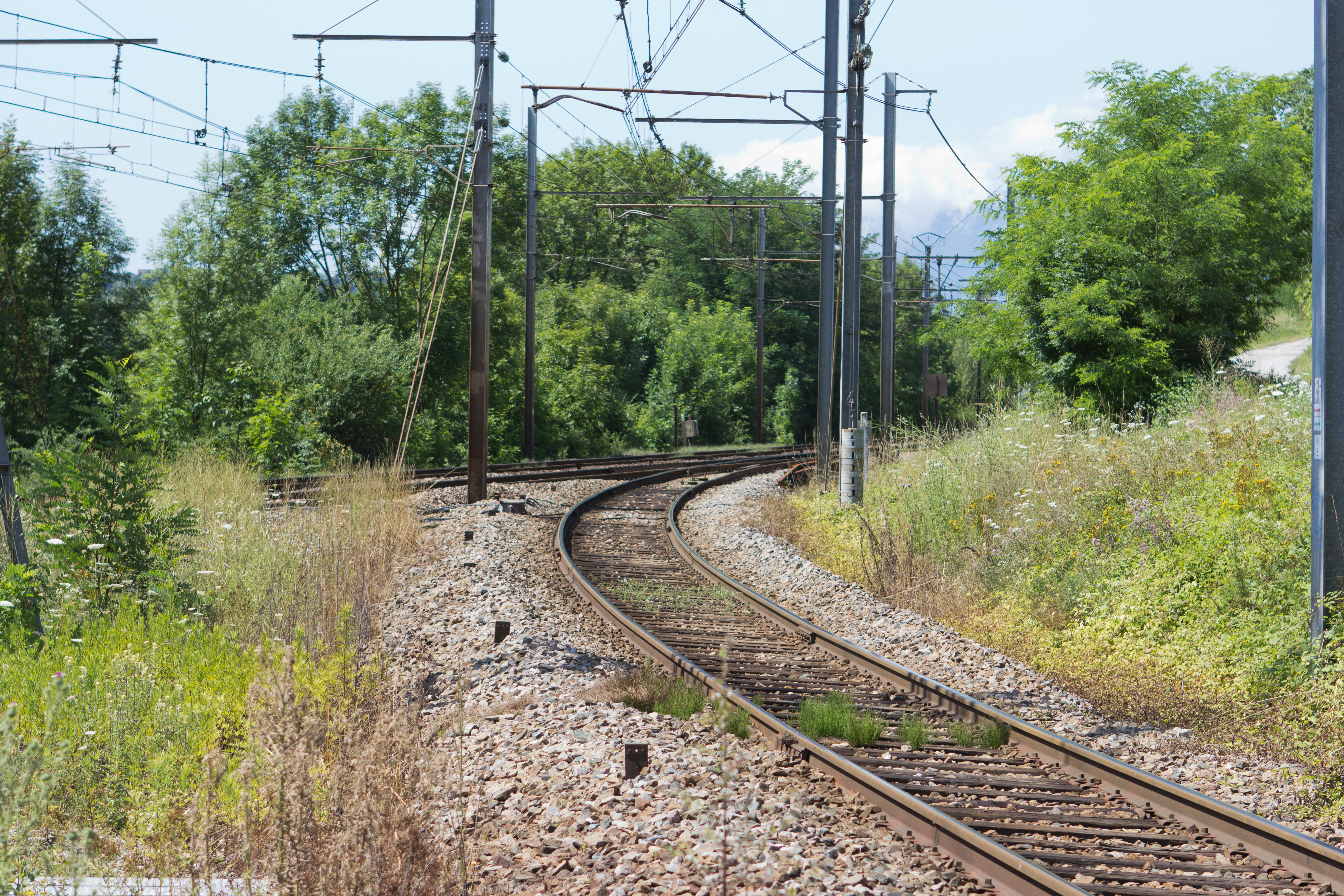 La ligne de la Tarentaise au point de bifurcation avec la ligne de la Maurienne (vue en direction de Saint-Pierre-d'Albigny - point de bifurcation), département de Savoie, France.